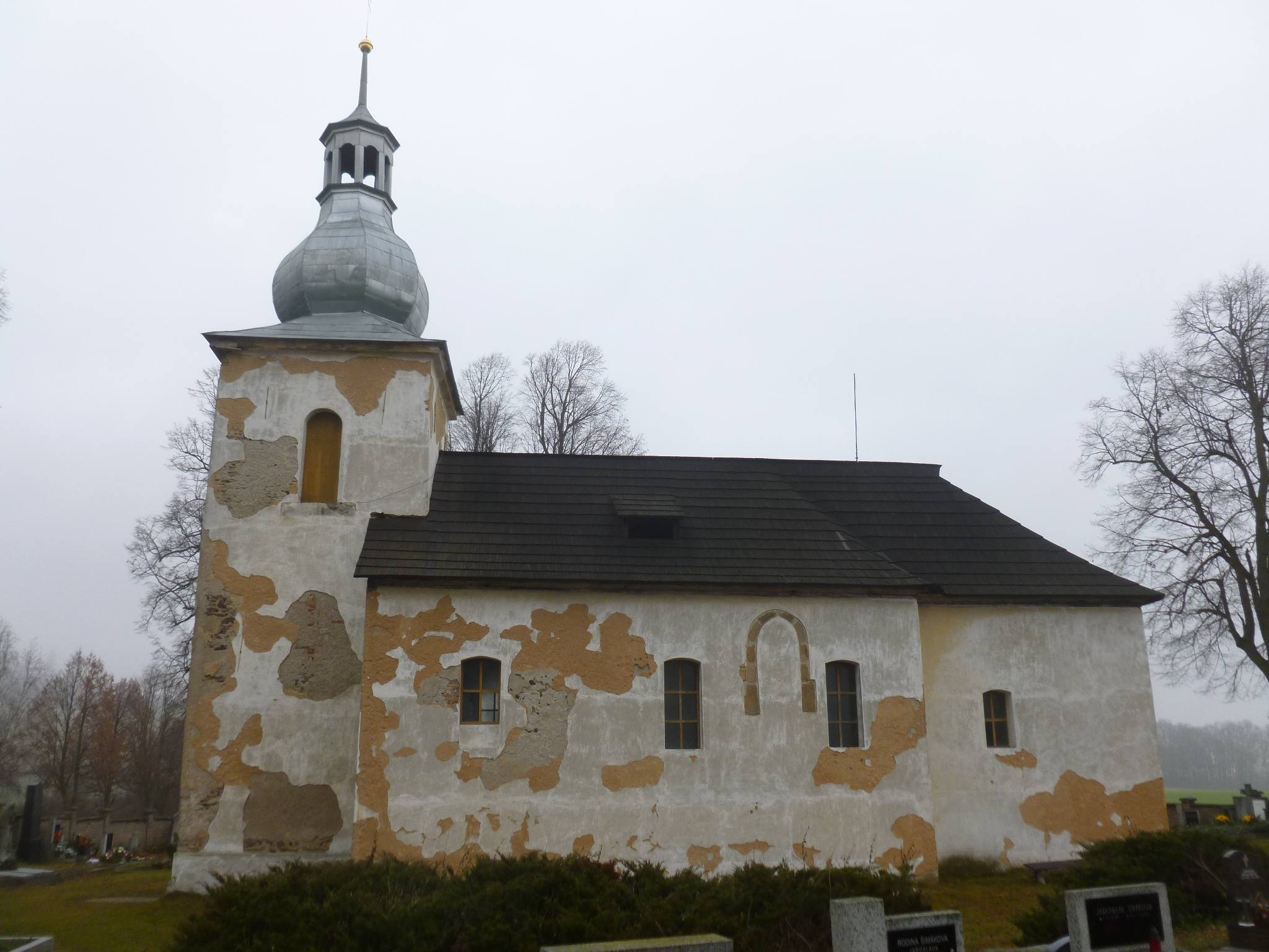 Stav kostela k roku 2012